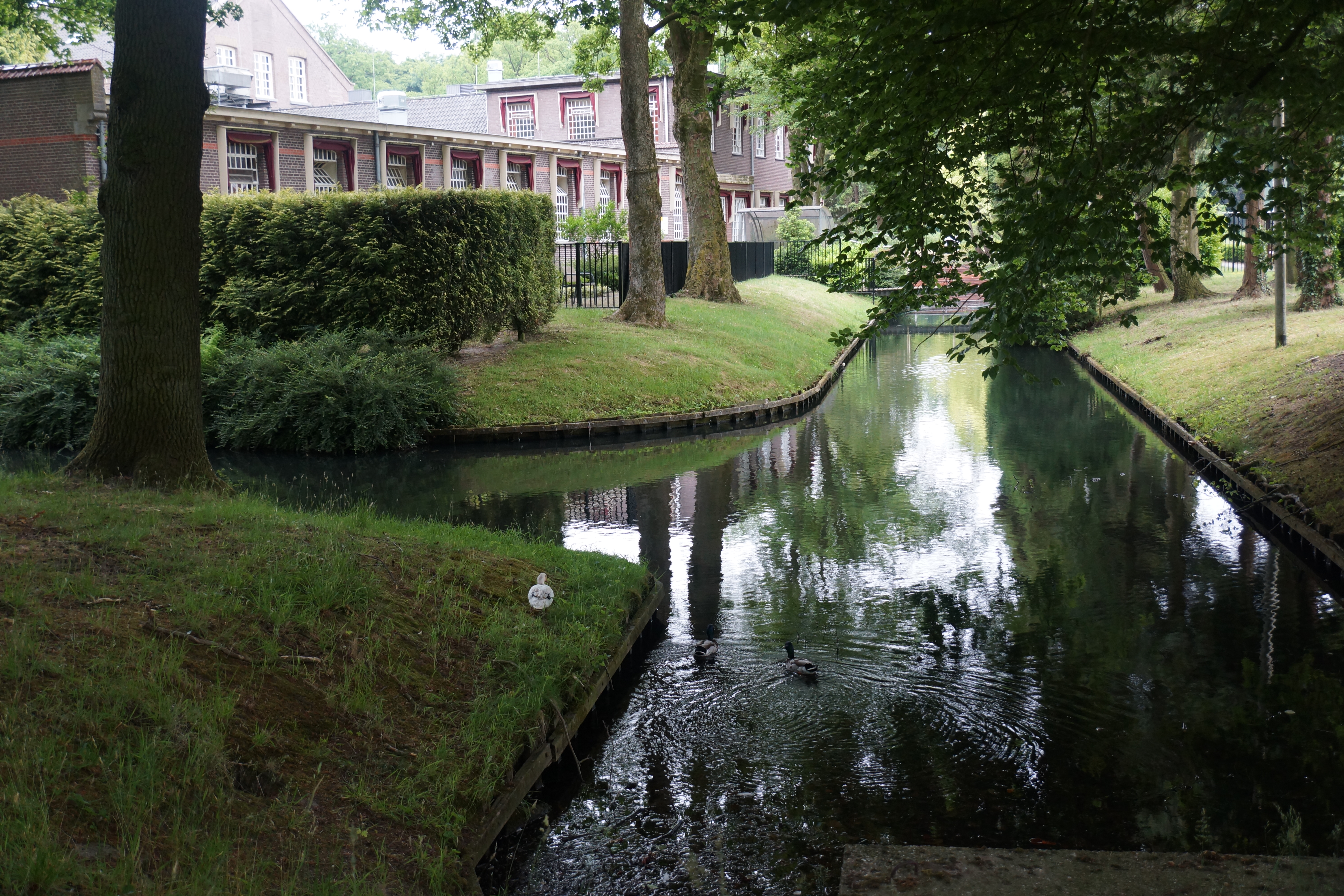 Kruisberg Doetinchem gracht 150614 (7)